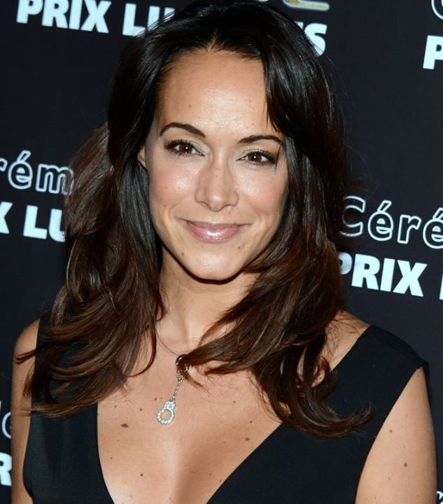 Karine Lima à la cérémonie des prix Lumières 2014